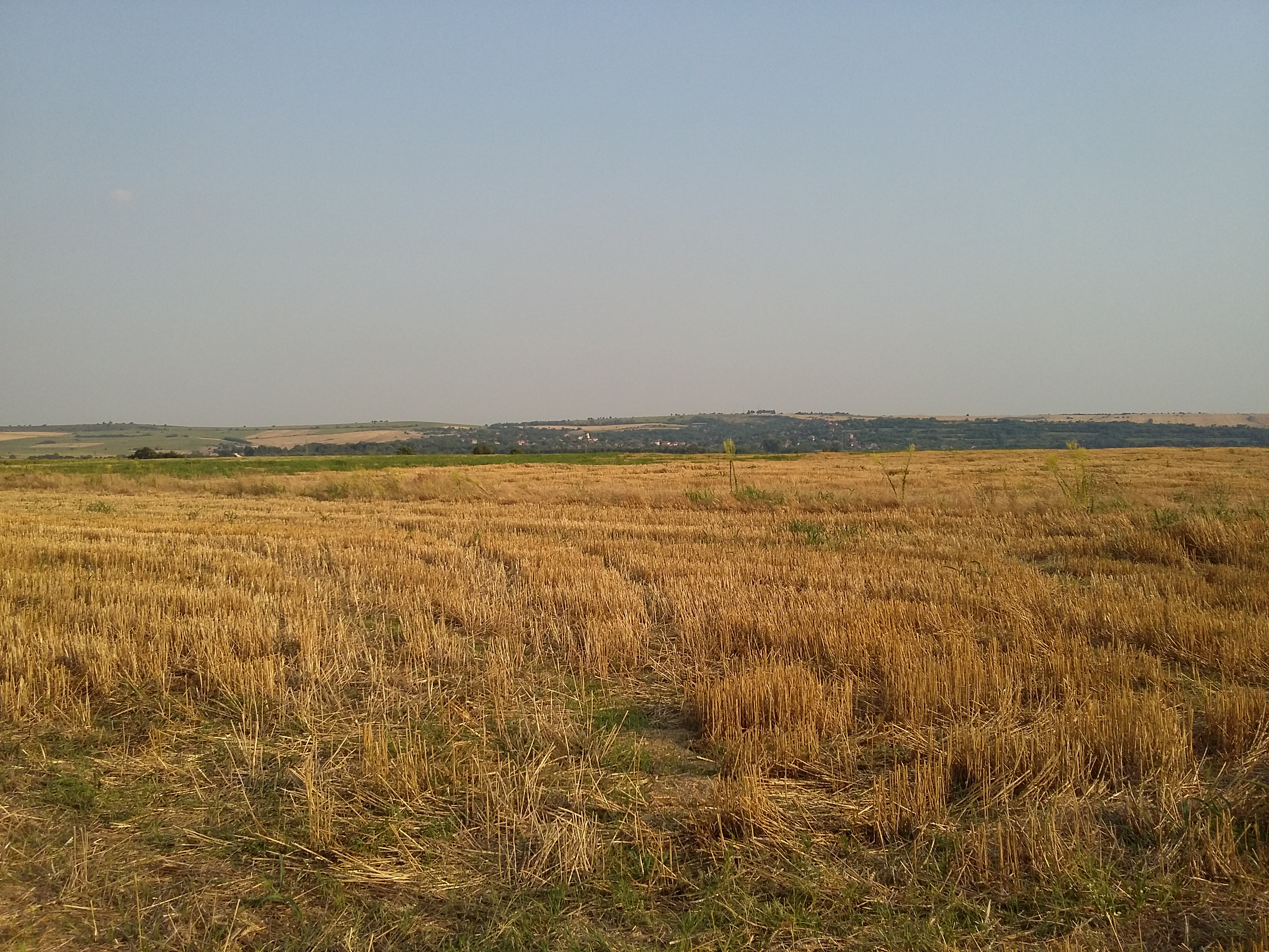 Гъмзово, област Видин, изглед от местността "Ливадски кладенец"